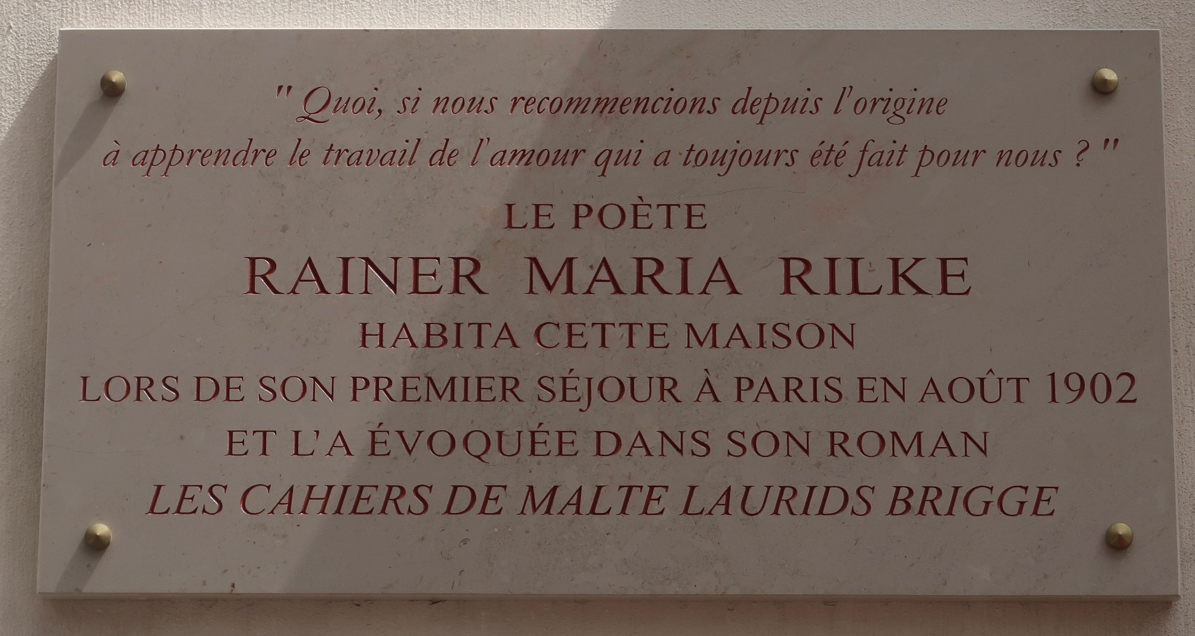 Plaque en hommage à l'écrivain Rainer Maria Rilke, 11 rue Toullier (Paris, 5e).